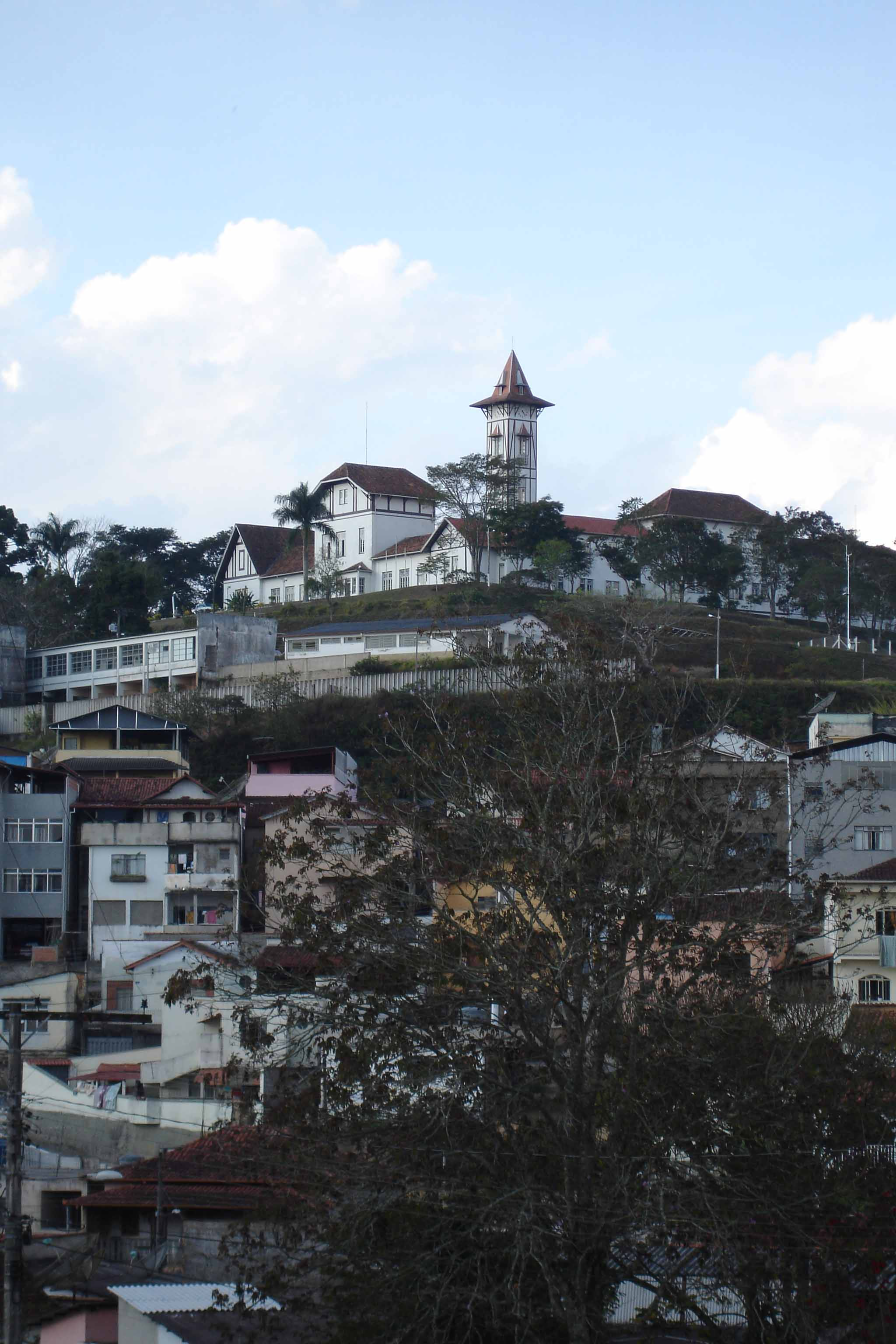 Escola Agrotécnica Federal Barbacena